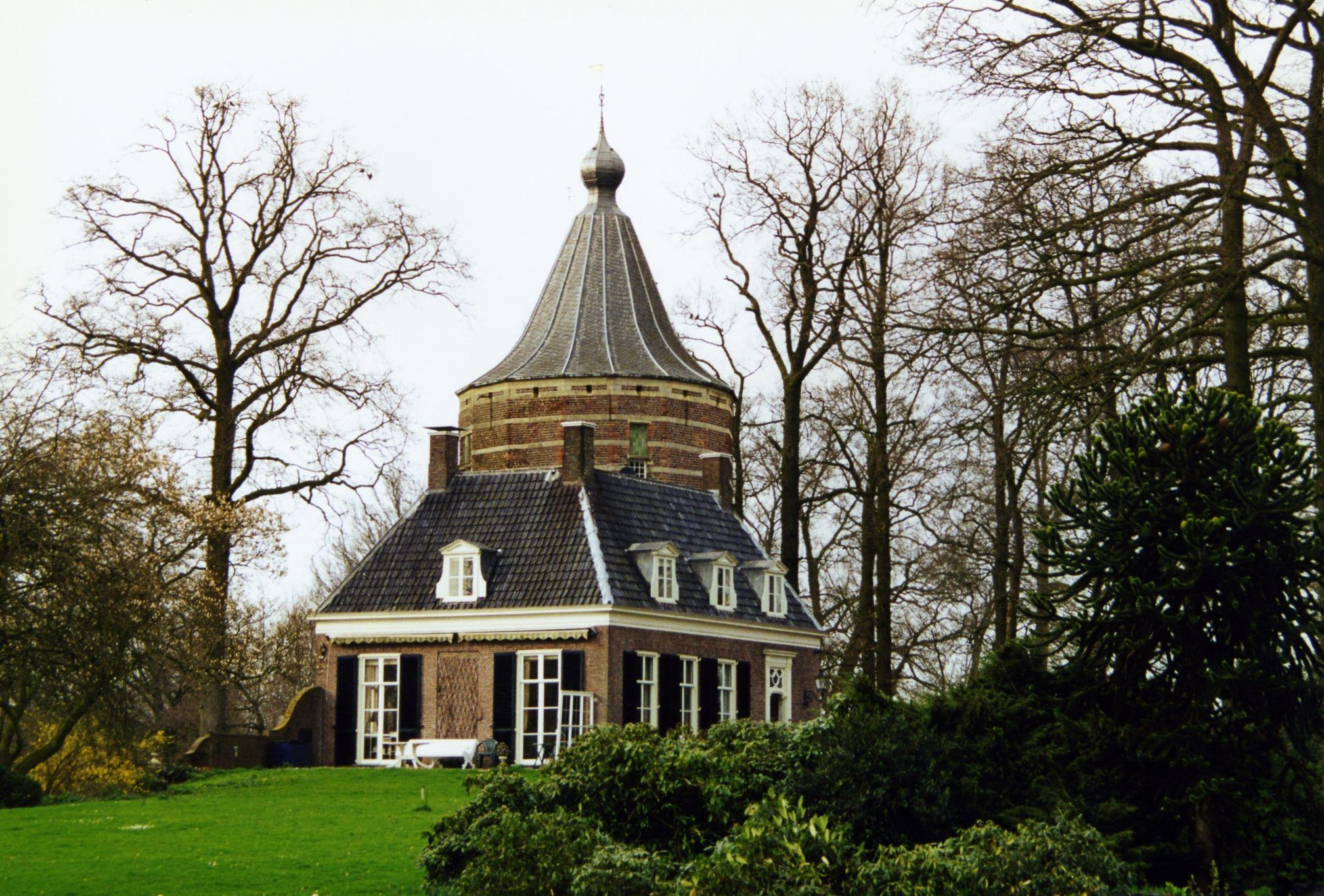 Kasteel de Kemnade te Wijnbergen.